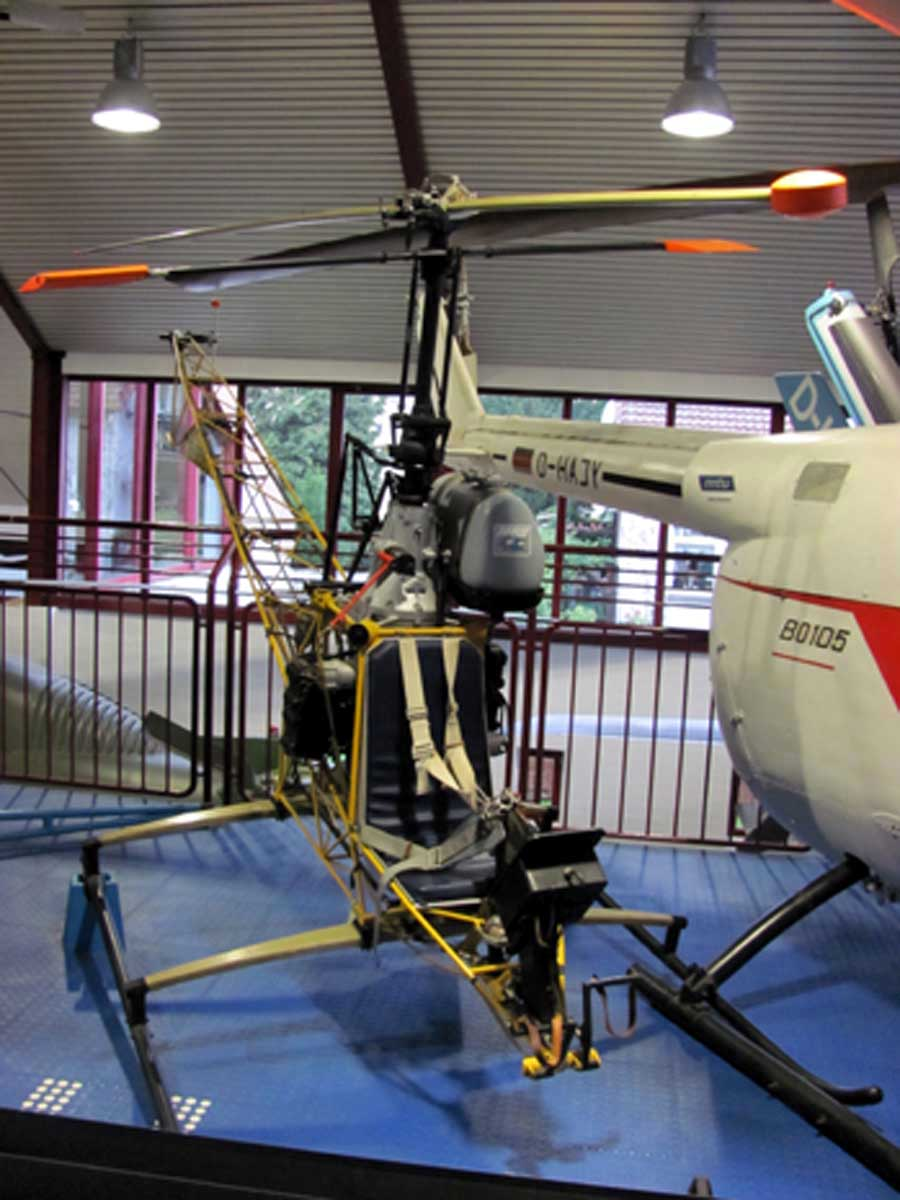 Bölkow Bo 103, ein einsitziger Experimentalhubschrauber, im Hubschraubermuseum Bückeburg